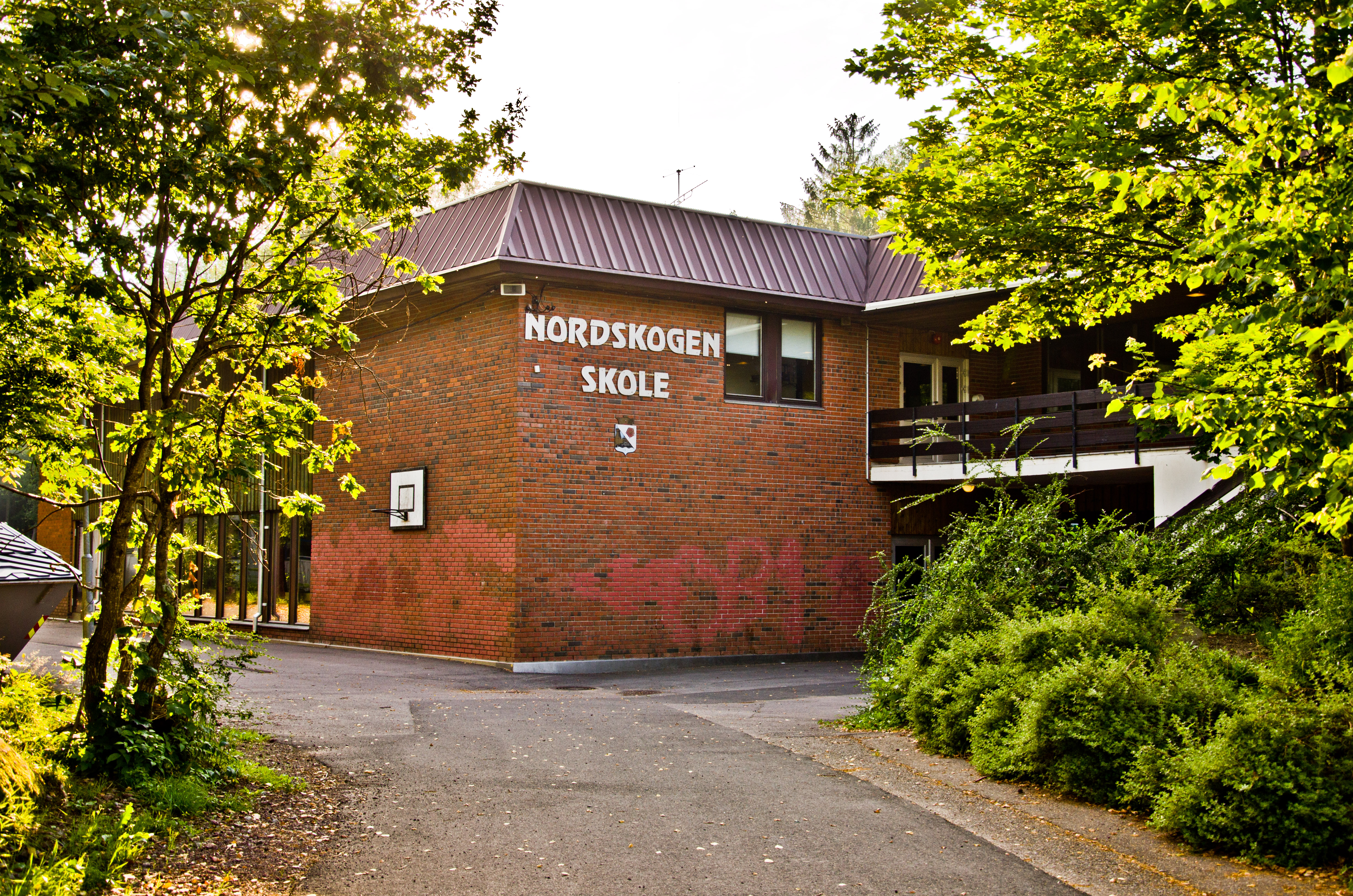 Nordskogen Skole, Horten